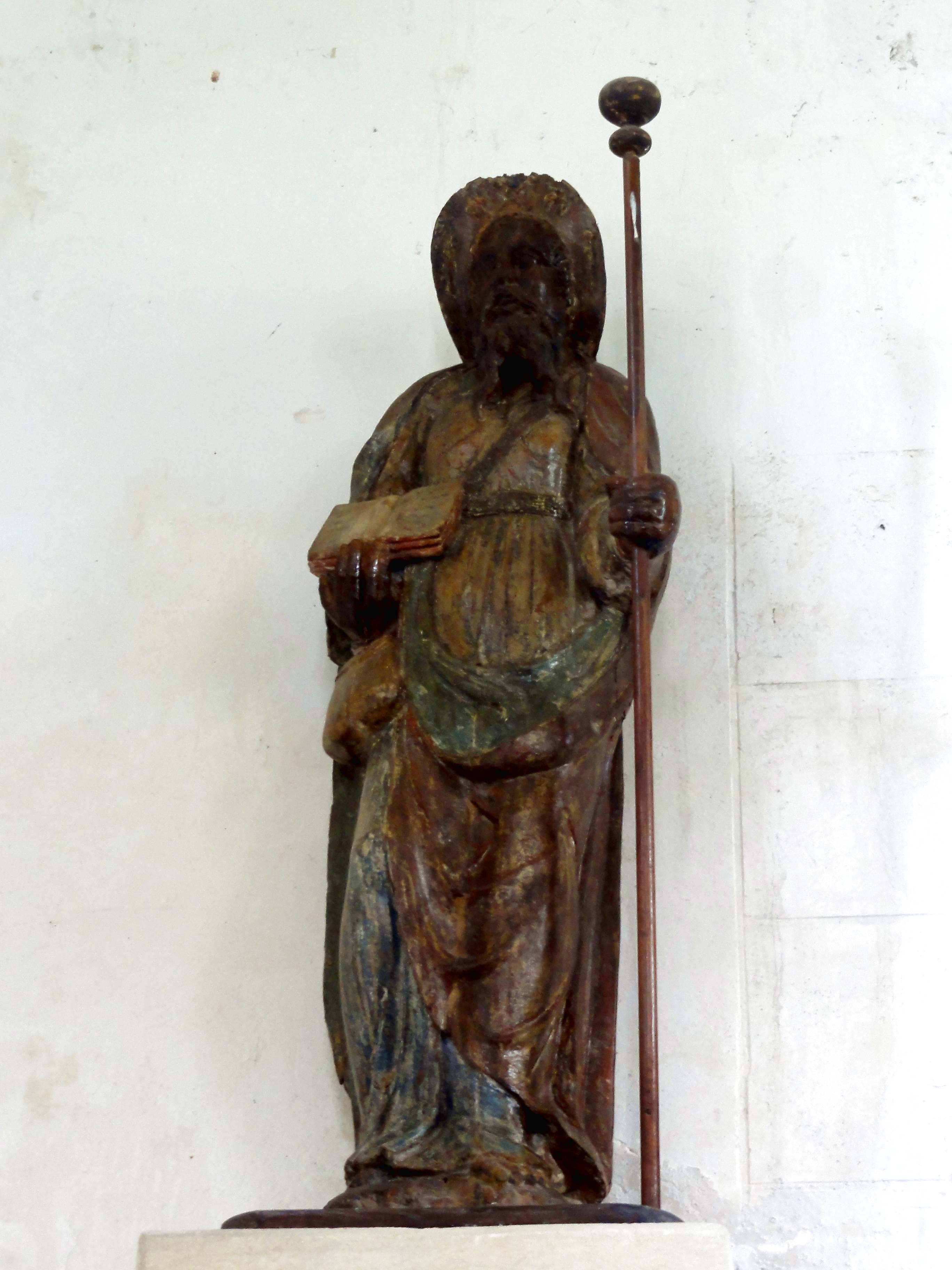 Statue de saint Jacques le Majeur.